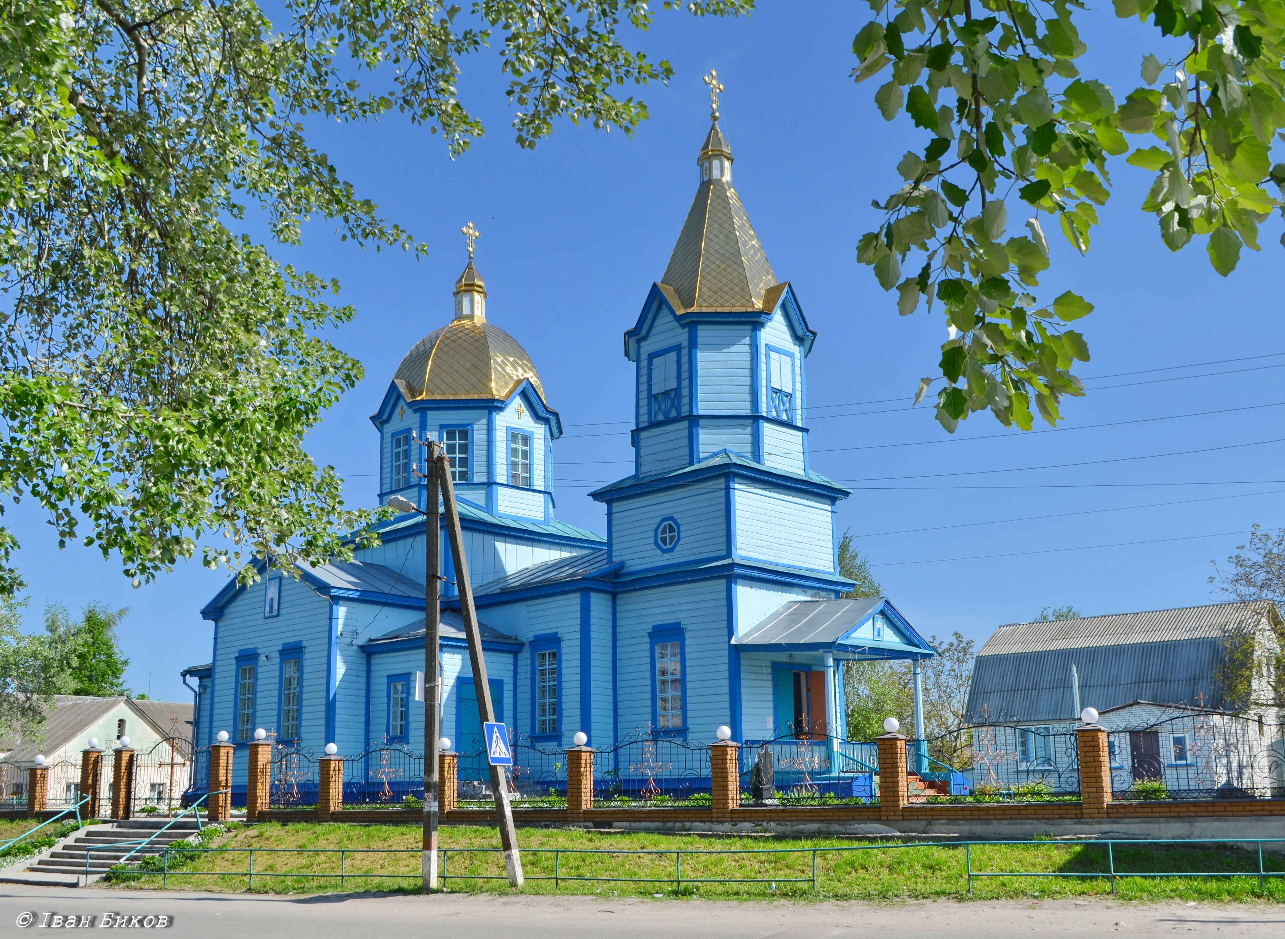 Покровська церква (дер.), село Плоське